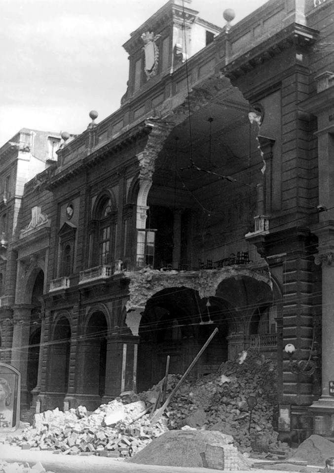 Napoli, agosto 1965. Crollo della facciata della Galleria Principe di Napoli, in Piazza Museo. Autore sconosciuto.